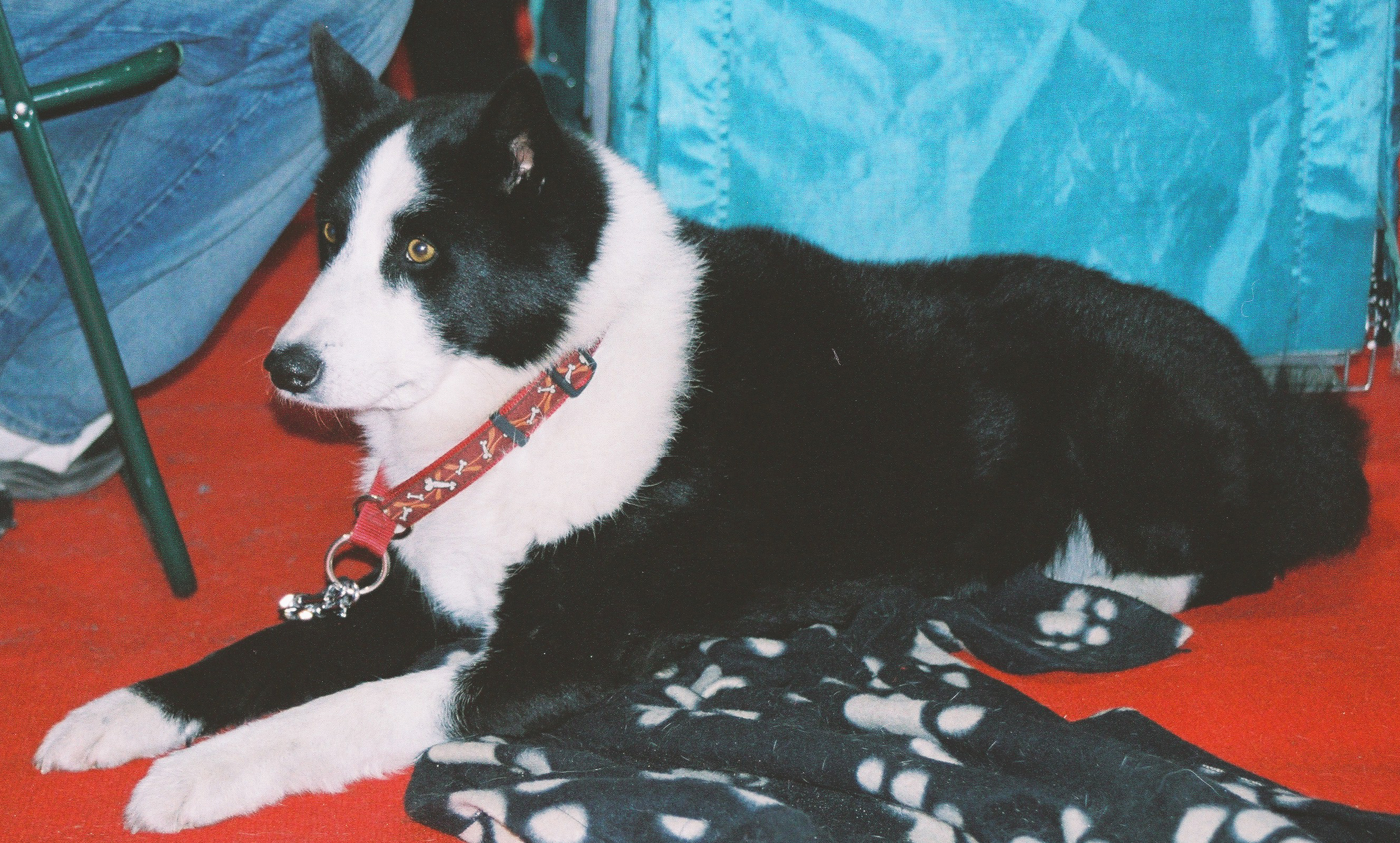 autor: Pleple2000 09:49, 5 April 2006 (UTC)